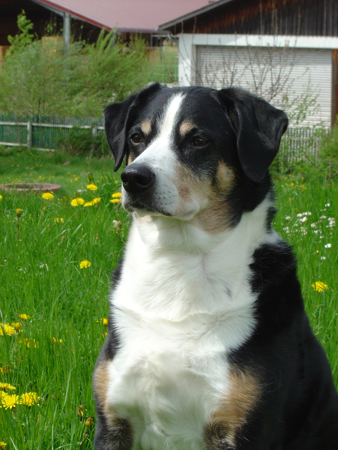 Appenzeller Sennhund